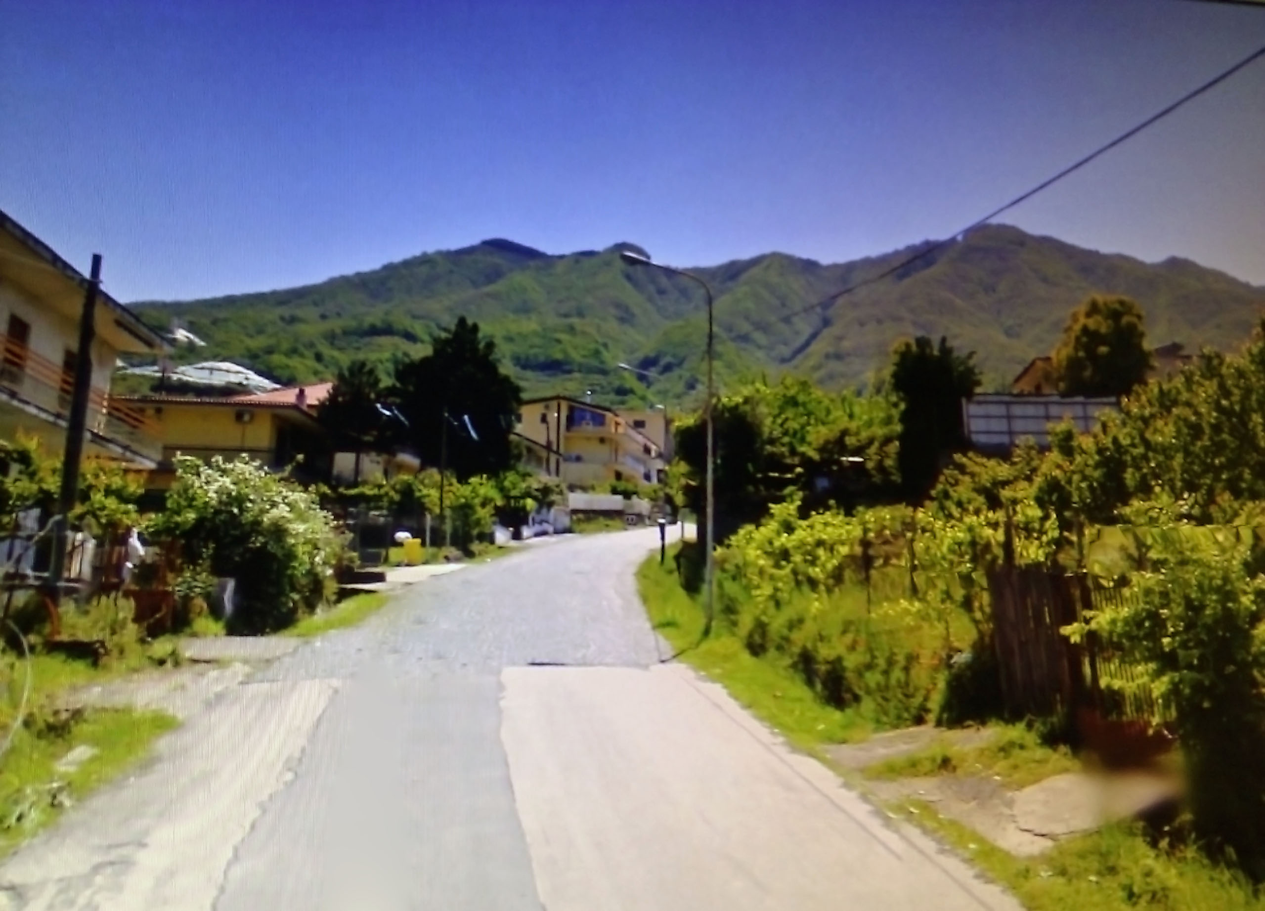 Monte Somma visto da Santa Maria delle Grazie a Castello (Somma Vesuviana).